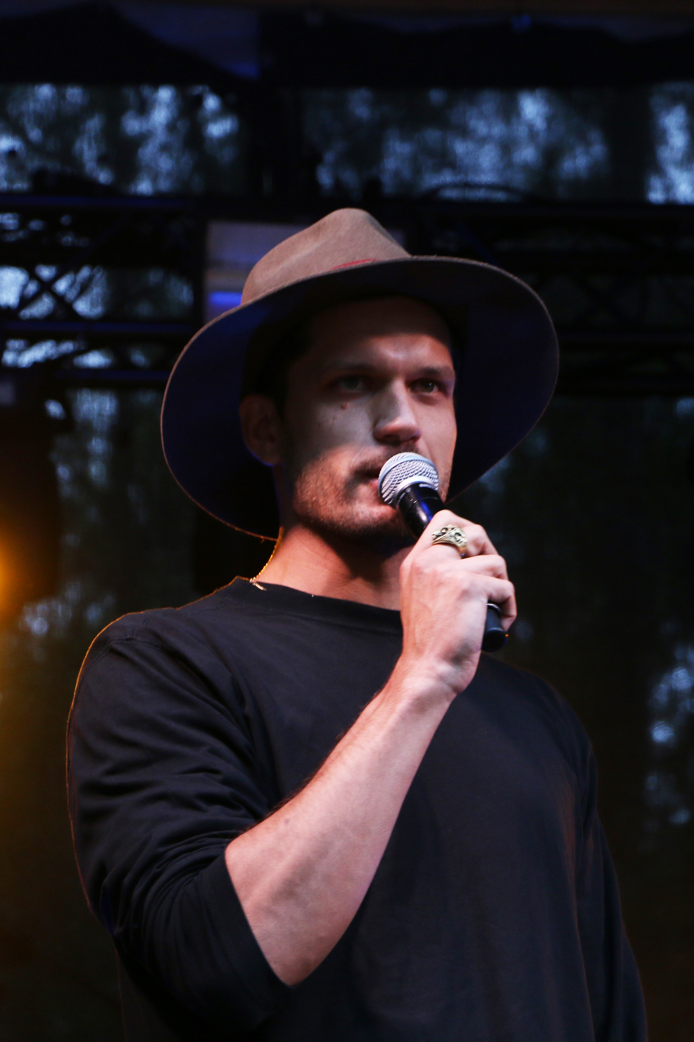 Reket esinemas Intsikurmu muusikafestivalil 2016. aastal.